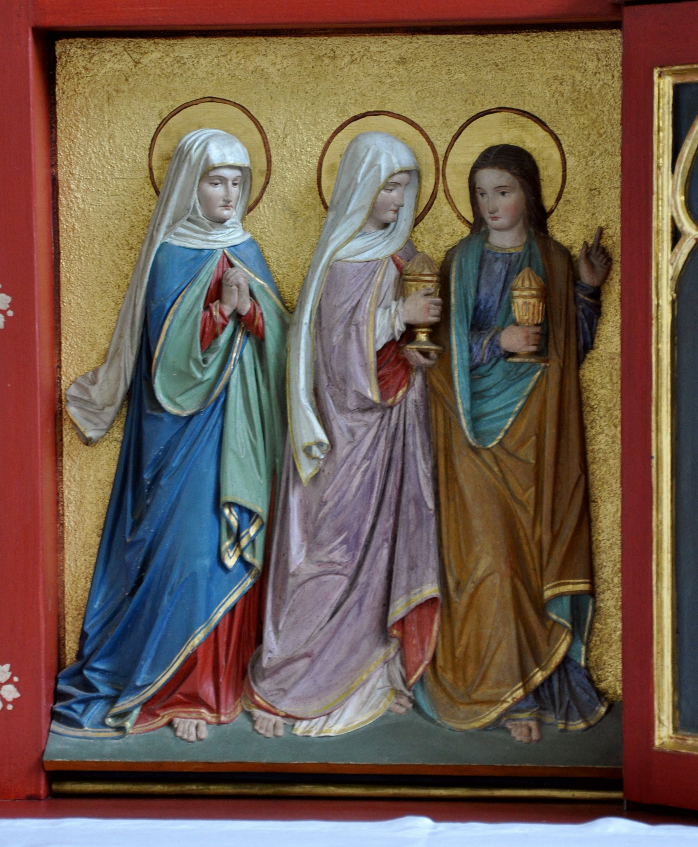 Friedrichshafen, Ortsteil Ailingen, Katholische Pfarrkirche St. Johannes Baptist, Altar an der Chorrückwand, 1985 aufgestellte Zusammenstellung von Teilen der ehemaligen neugotischen Ausstattung der Kirche Predella: Relief „Drei Frauen am Grab“ vom 1948 abgebrochenen Rosenkranzaltar von Metz, 1877